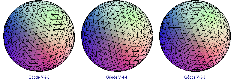 Trois exemples de géodes de paramètre V (in english : geodesic domes)